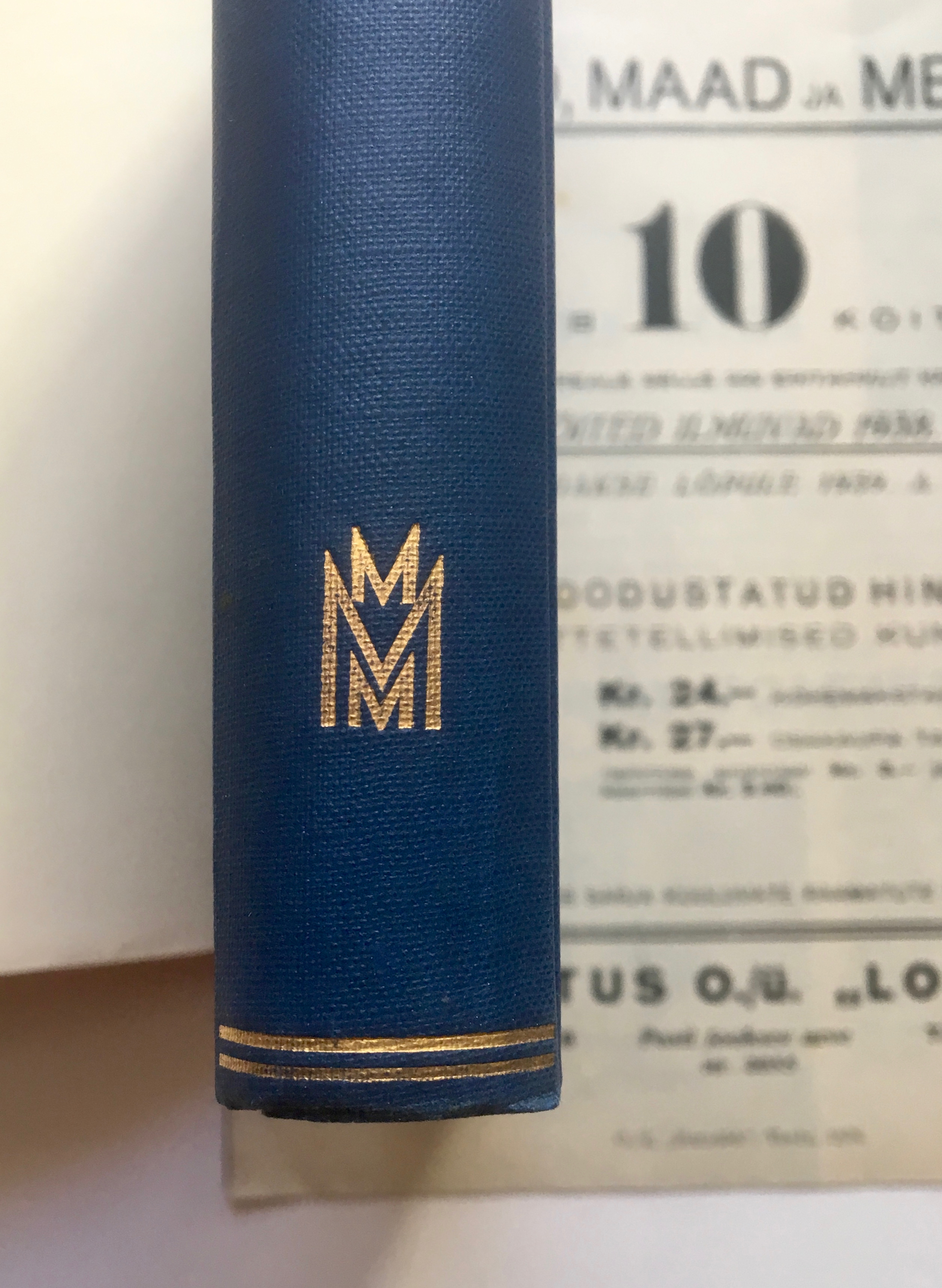 Raamatu selg